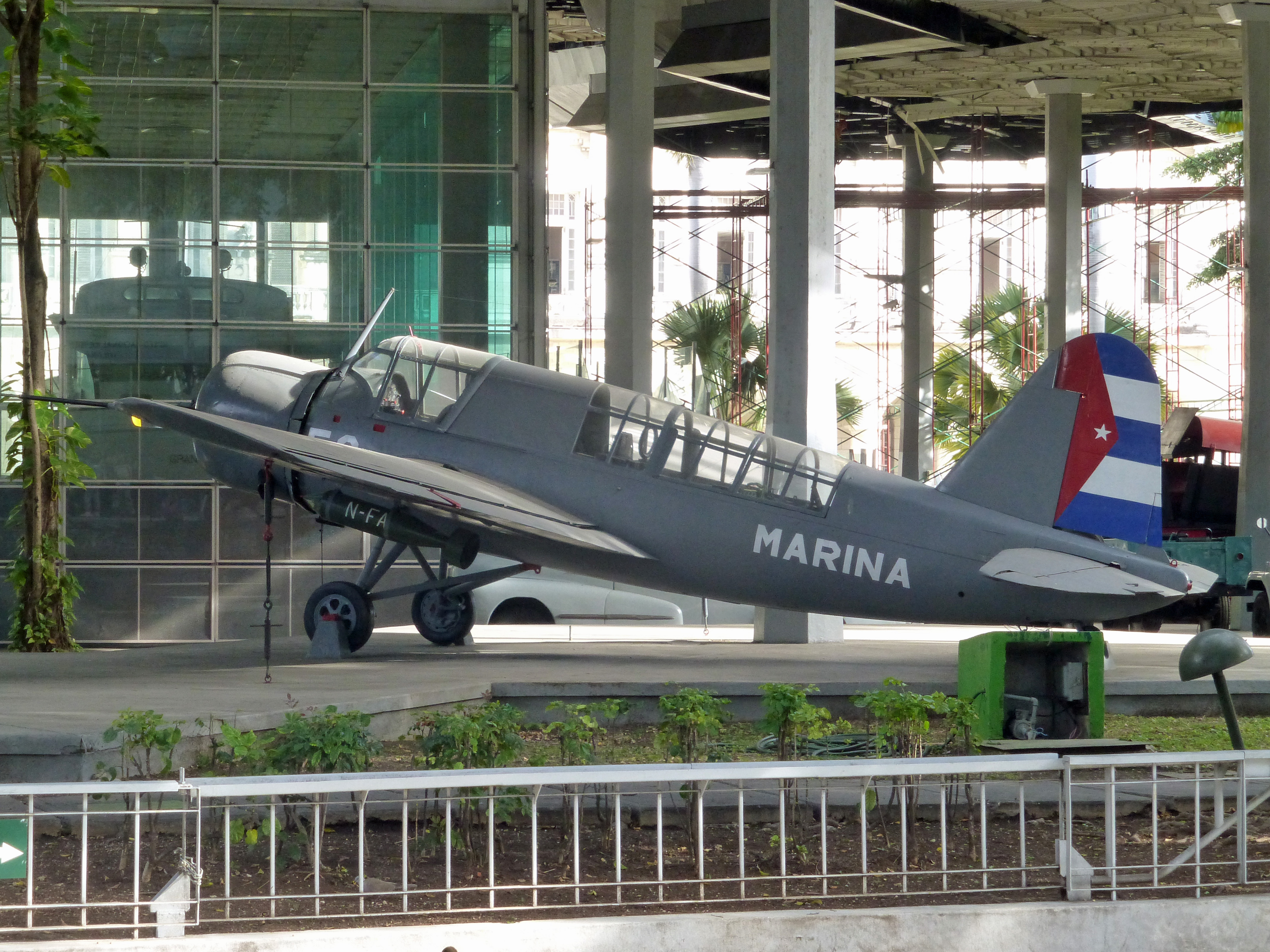 La Havane : Musée de la Révolution